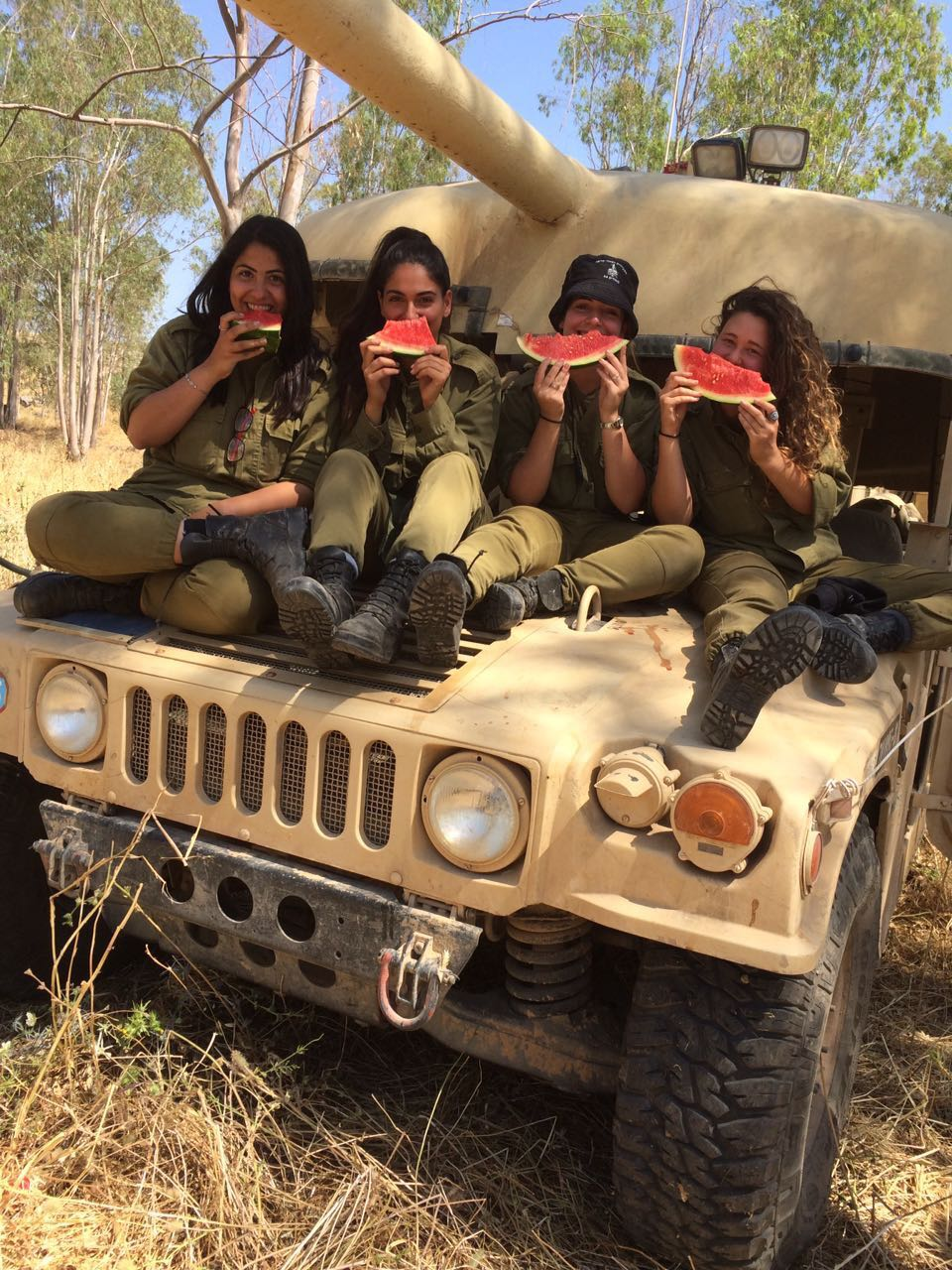 מפעילות בעצירה באמצע תרגיל בשטח